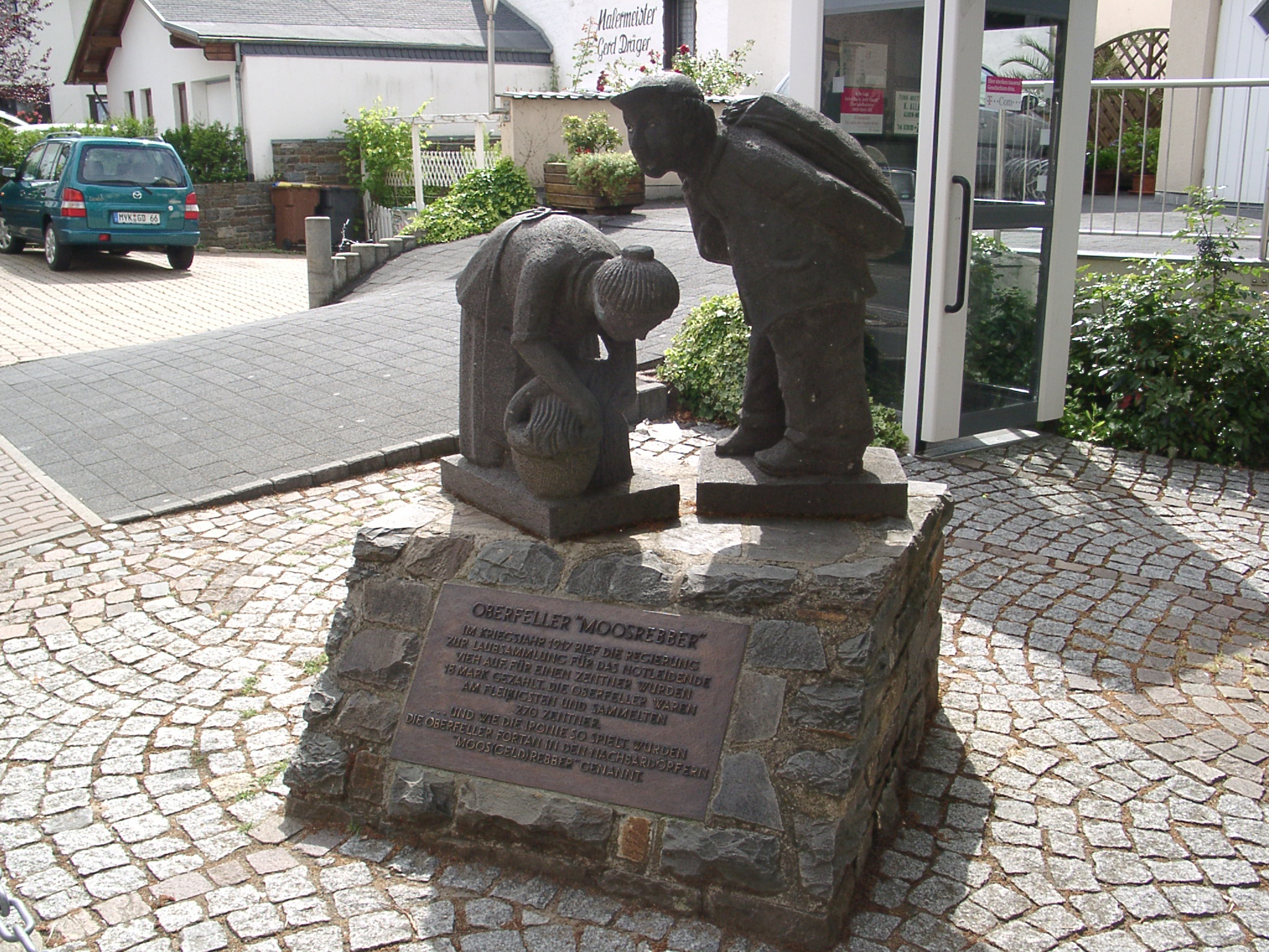 Moosrebber-Denkmal Oberfell - selbst fotografiert (Klaus Graf) 3.7.2005